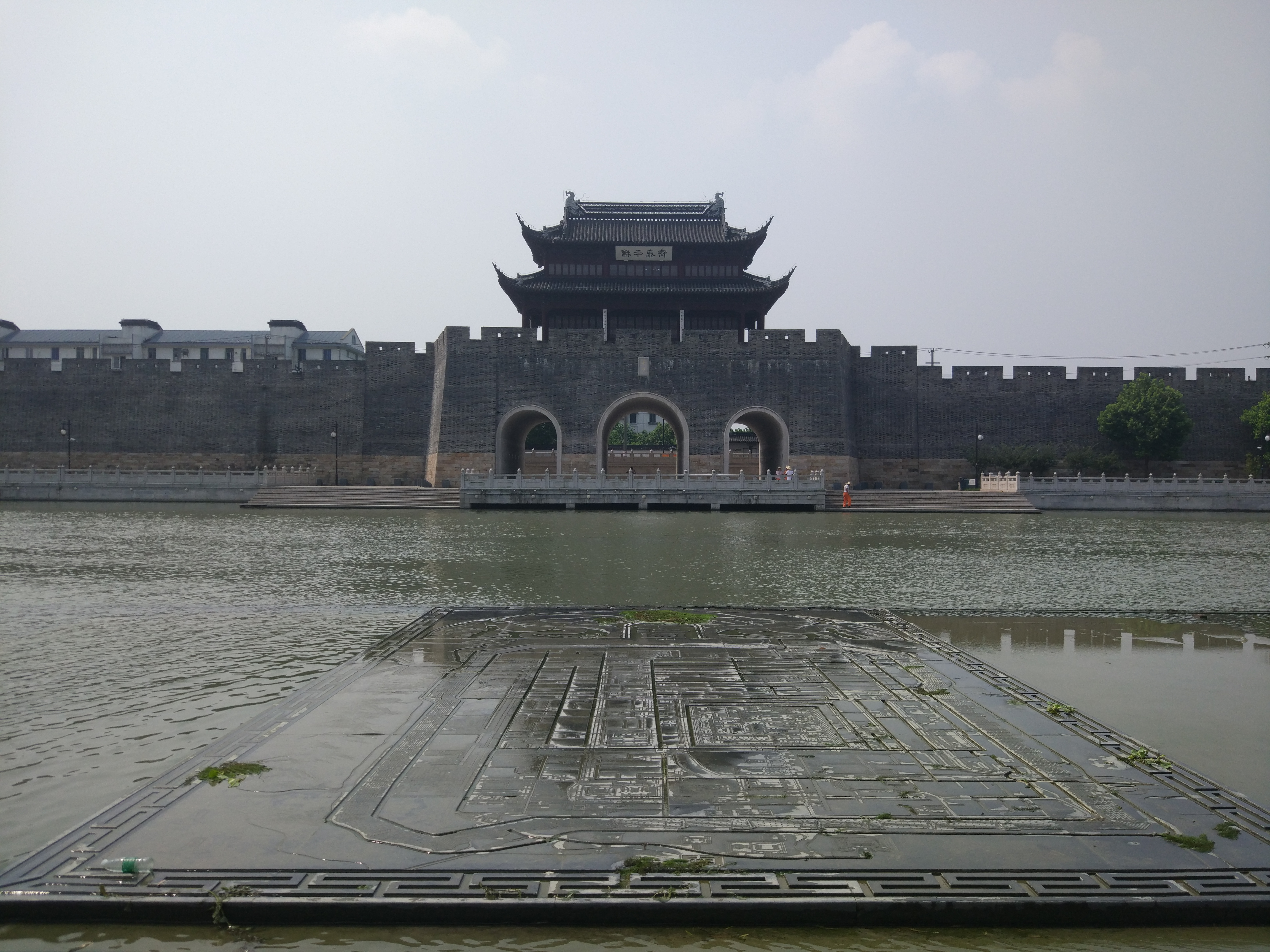 苏州平门陆城门和护城河，对面是苏州火车站南广场，摄于2017年7月